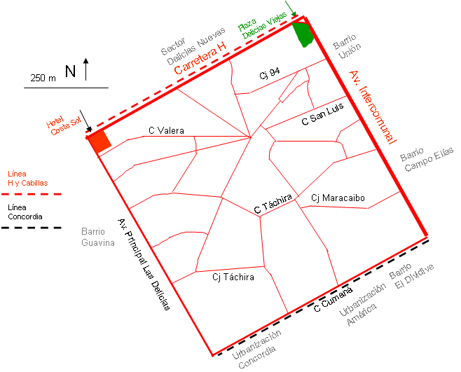 Mapa del sector Delicias Viejas de la ciudad de Cabimas, Parroquia Carmen Herrera, municipio Cabimas, Estado Zulia, Venezuela